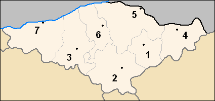 Sujet : carte des obchtini (municipalités) de l'oblast de Silistra, en Bulgarie Auteurs : Потребител:Ljubo (Любомир Таушанов = Lyoubomir Taouchanov), pour la version originale en bulgare, Utilisateur:Hégésippe Cormier, pour l'adaptation française (repères chiffrés) Source : Картинка:Silistra Oblast map.PNG (7 mai 2005) Licence